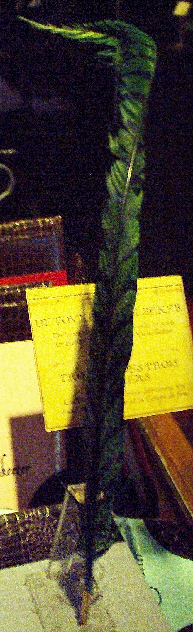 Fantaciteerveer (Engels: Quick-Quotes Quill) tijdens Harry Potter: The Exhibition in Brussel (België)